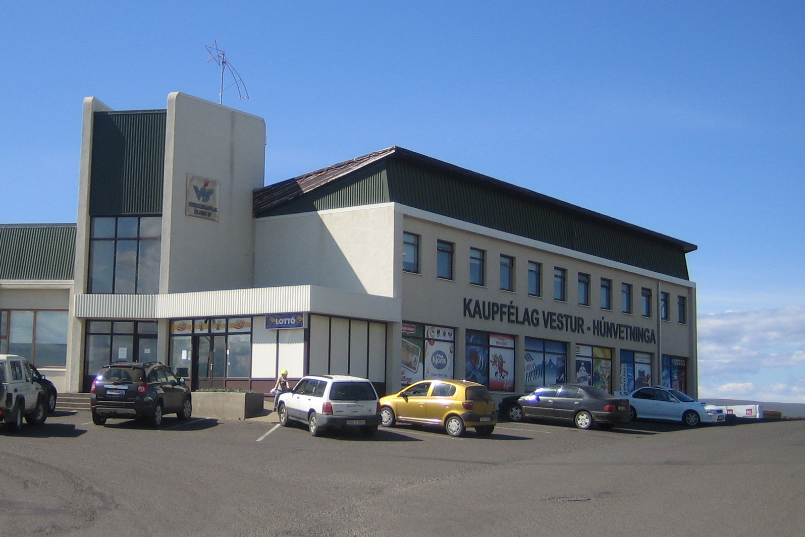 Kaupfélag Vestur-Húnvetninga á Hvammstanga